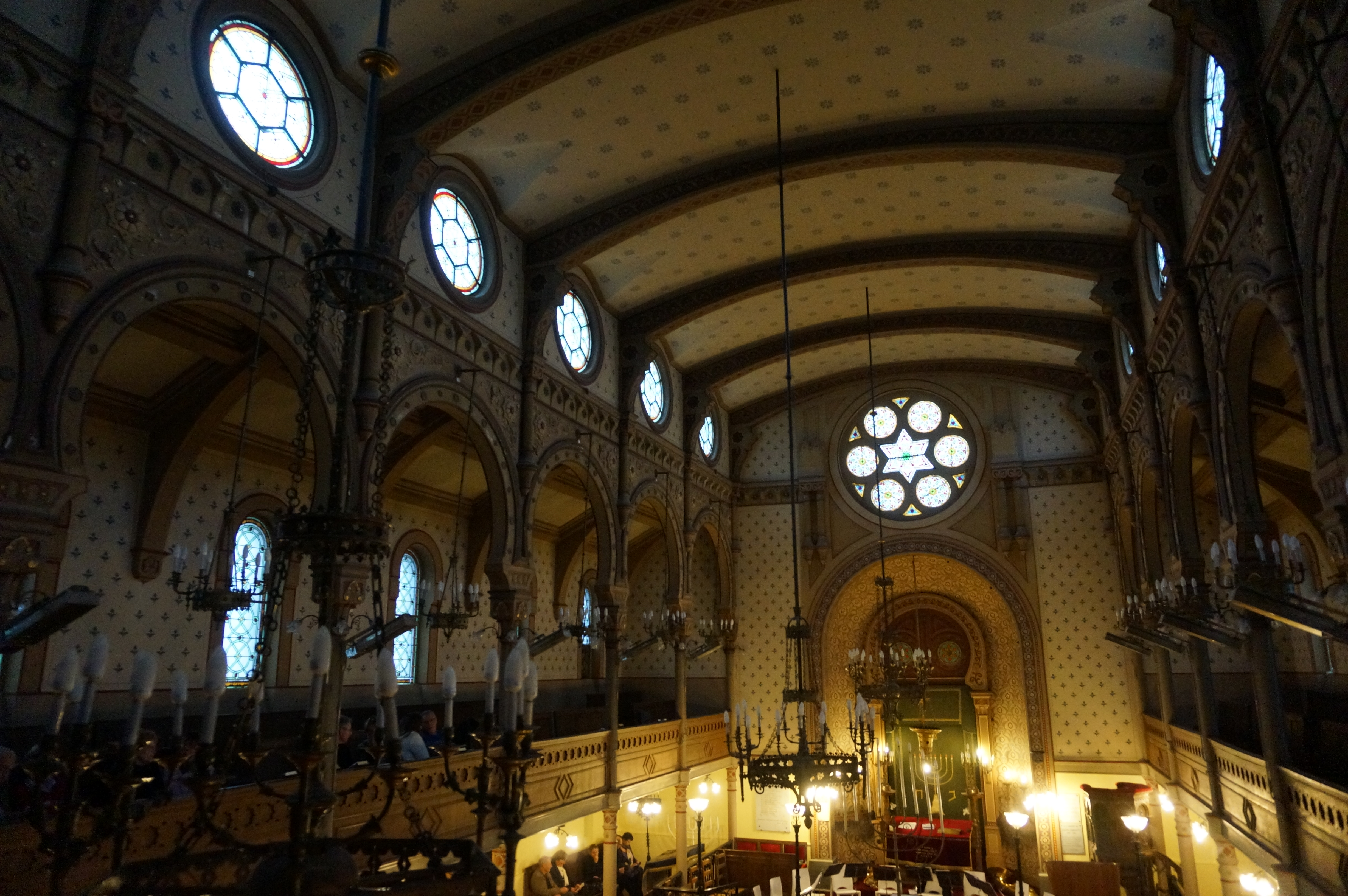 intérieur de la Synagogue de Reims.